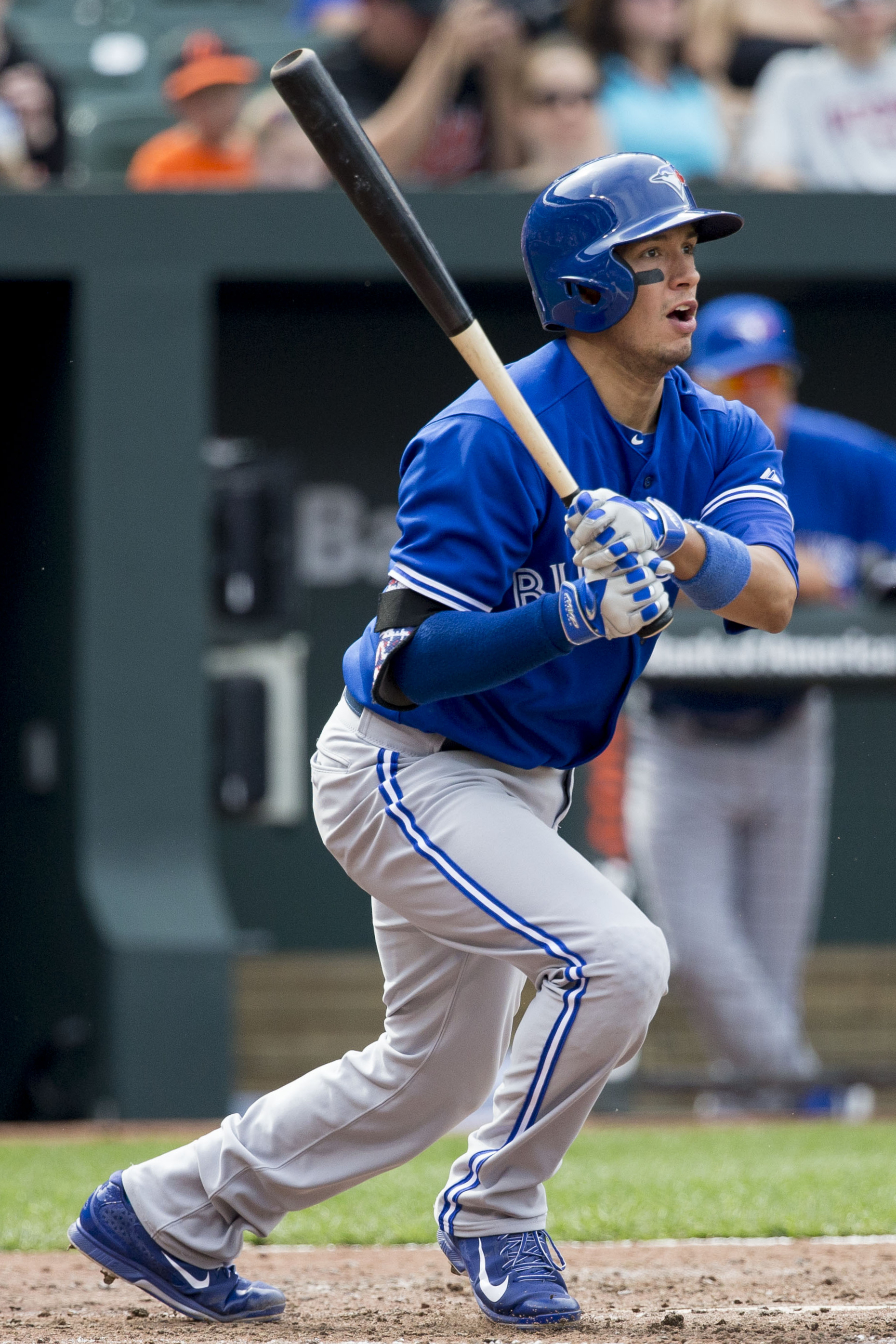 Ryan Goins